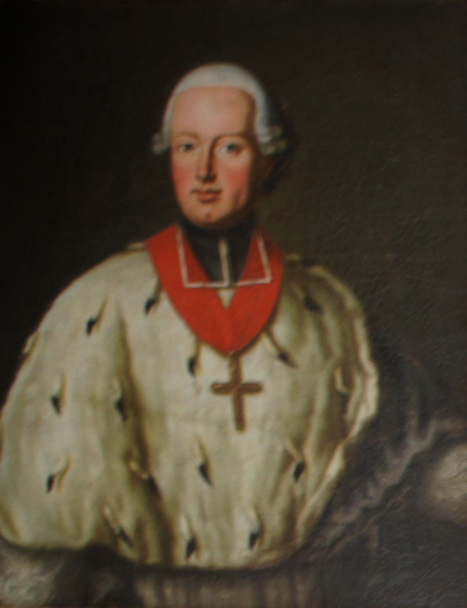 Porträtgemälde von Ludwig Joseph Freiherr von Welden, Fürstbischof von Freising, im Fürstengang zwischen Fürstbischöflicher Residenz und Freisinger Dom.